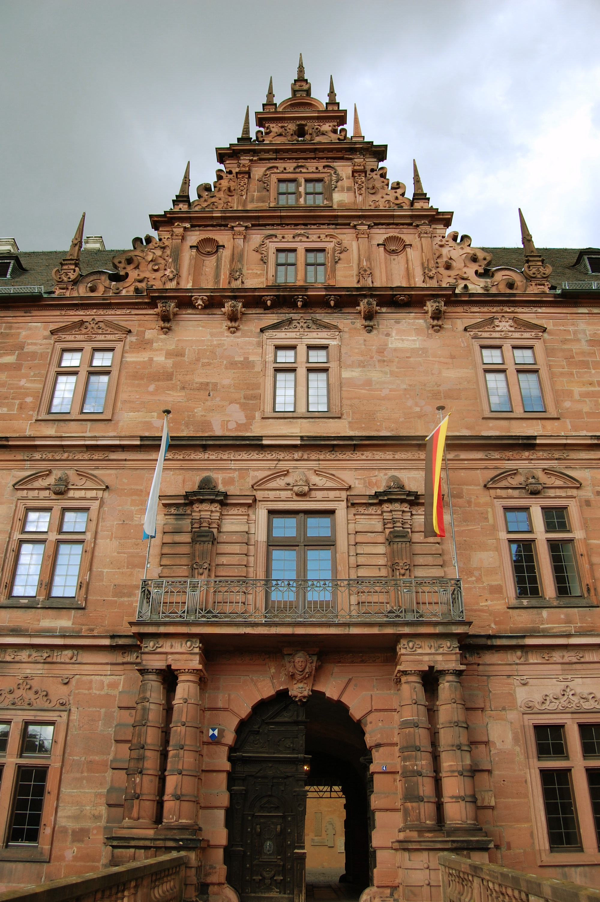 Współczesne wejście główne do zamku